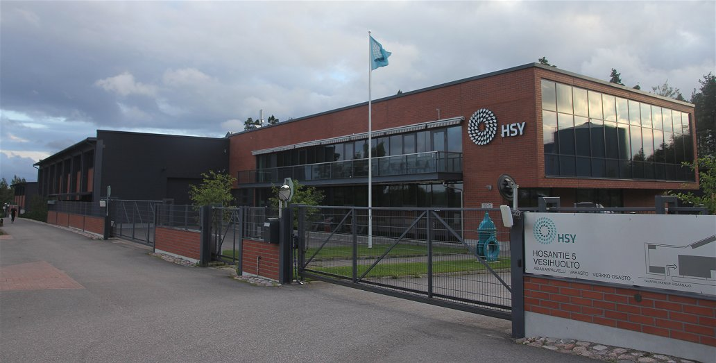 Helsingin seudun ympäristöpalvelut -kuntayhtymän vesihuollon toimitalo Vantaan Havukoskella.